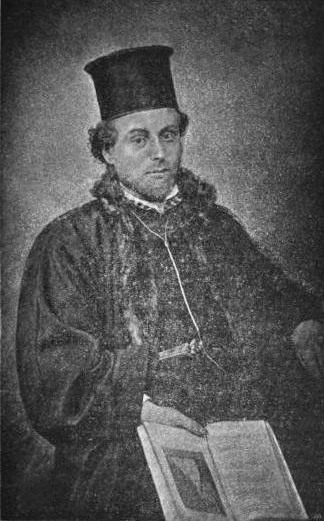 Ion Creangă diacon. Clişeu făcut cu cheltuiala Societăţii Studenţeşti "Carmen Sylva" din Iaşi. Imagine preluată din Şezătoarea - Revistă pentru literatură si tradiţiuni populare, Volumele 6-7, editată de Artur Gorovei, 1901 - pagina 120.